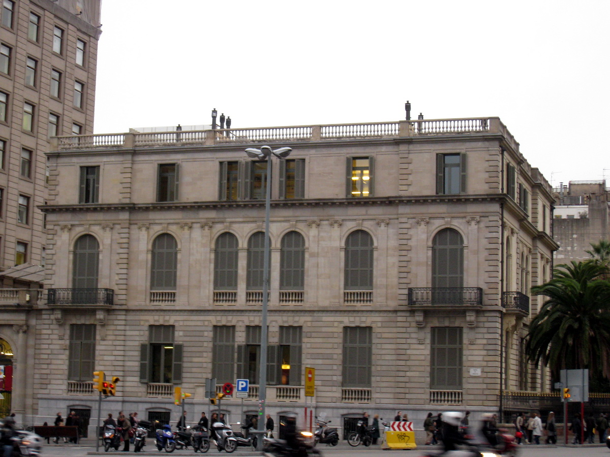 Palau Robert a Barcelona (Catalunya). Obra d'Henry Grandpierre i Joan Martorell i Montells de 1903.